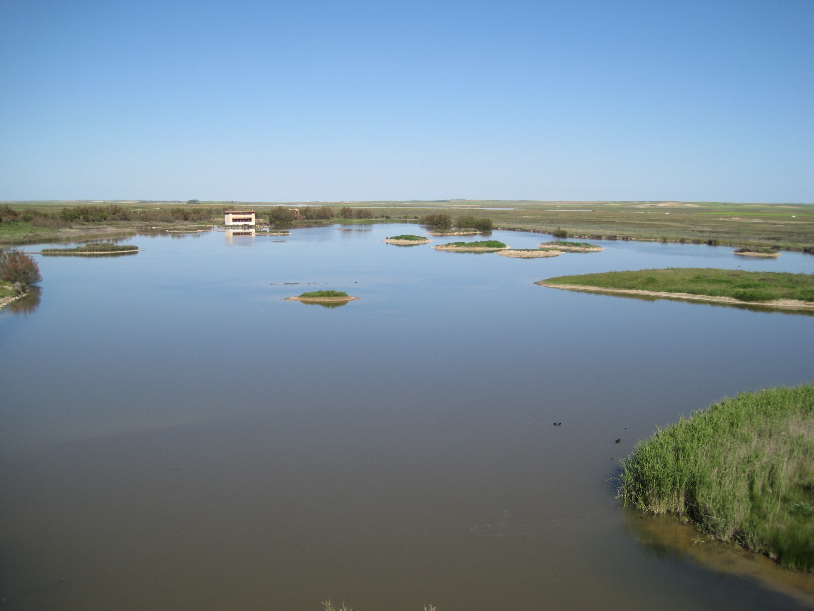 Lagunas de Villafáfila (Zamora, España). Laguna cercana a la Casa del Parque.